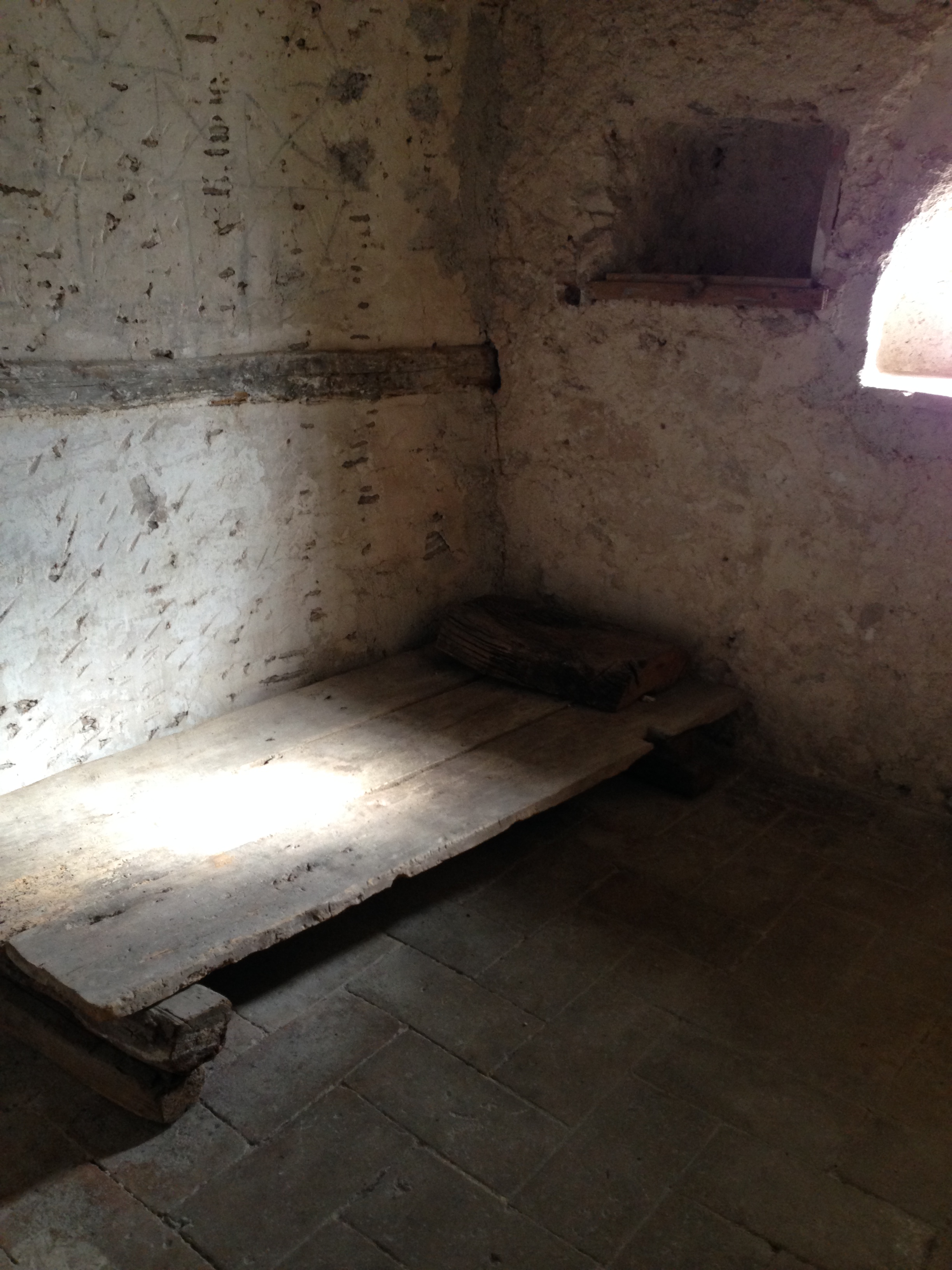 Eremo francescano. Monteluco. Celle del primo convento del 1218